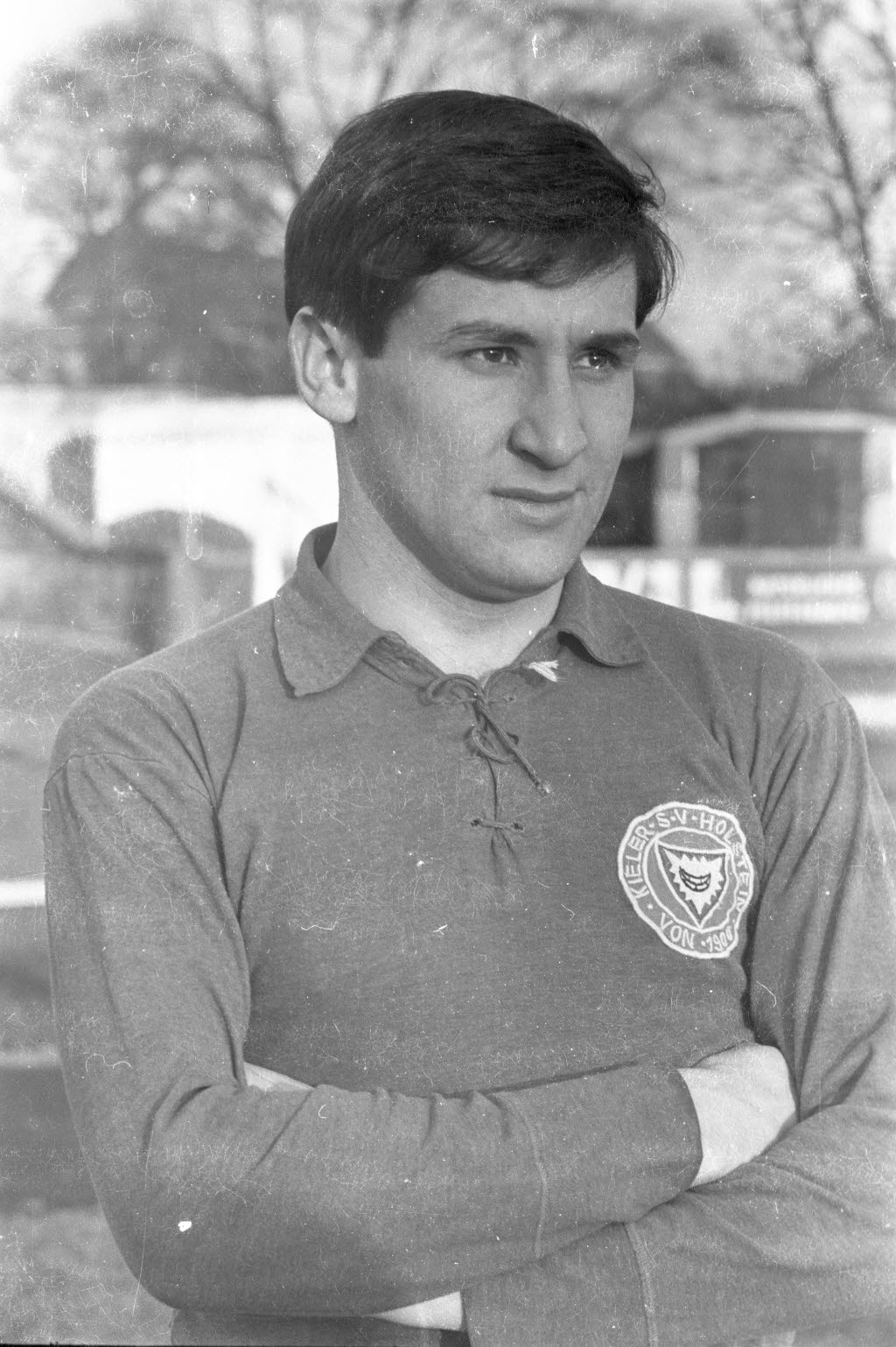 Fußballspieler von Holstein Kiel in der Saison 1964/1965.